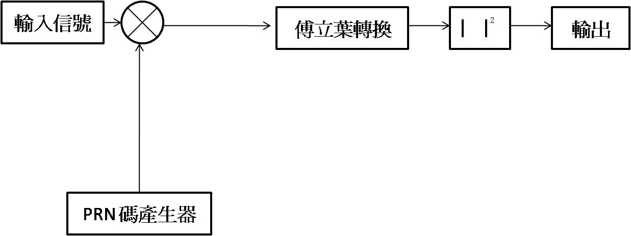 中文（台灣）: 平行頻率空間搜尋流程圖